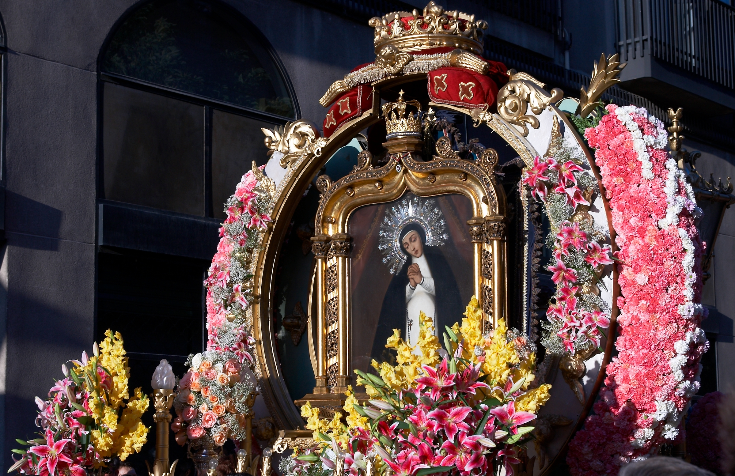 Fiestas de la Paloma 2007, Madrid, España.